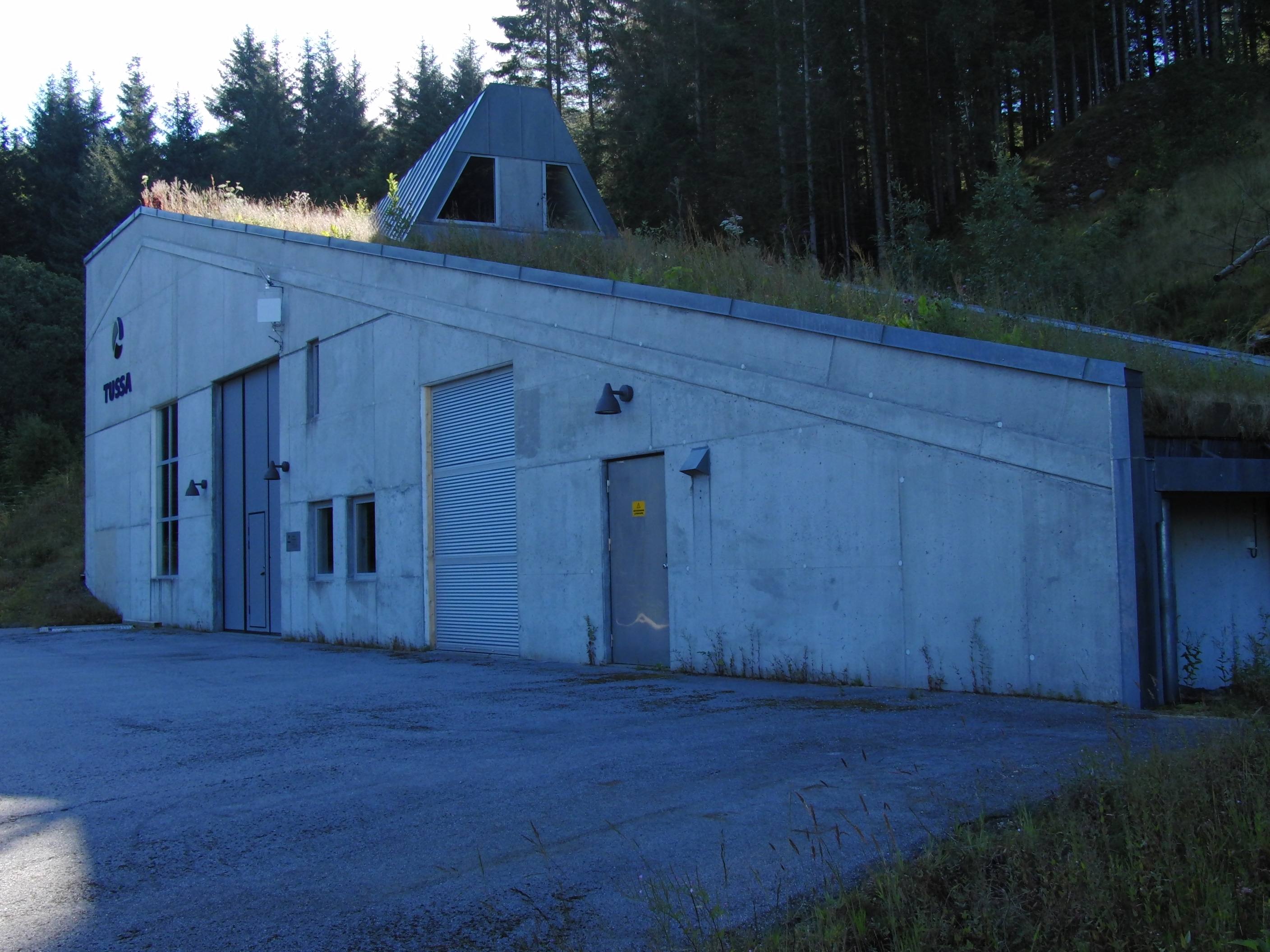 Vedeld kraftverk